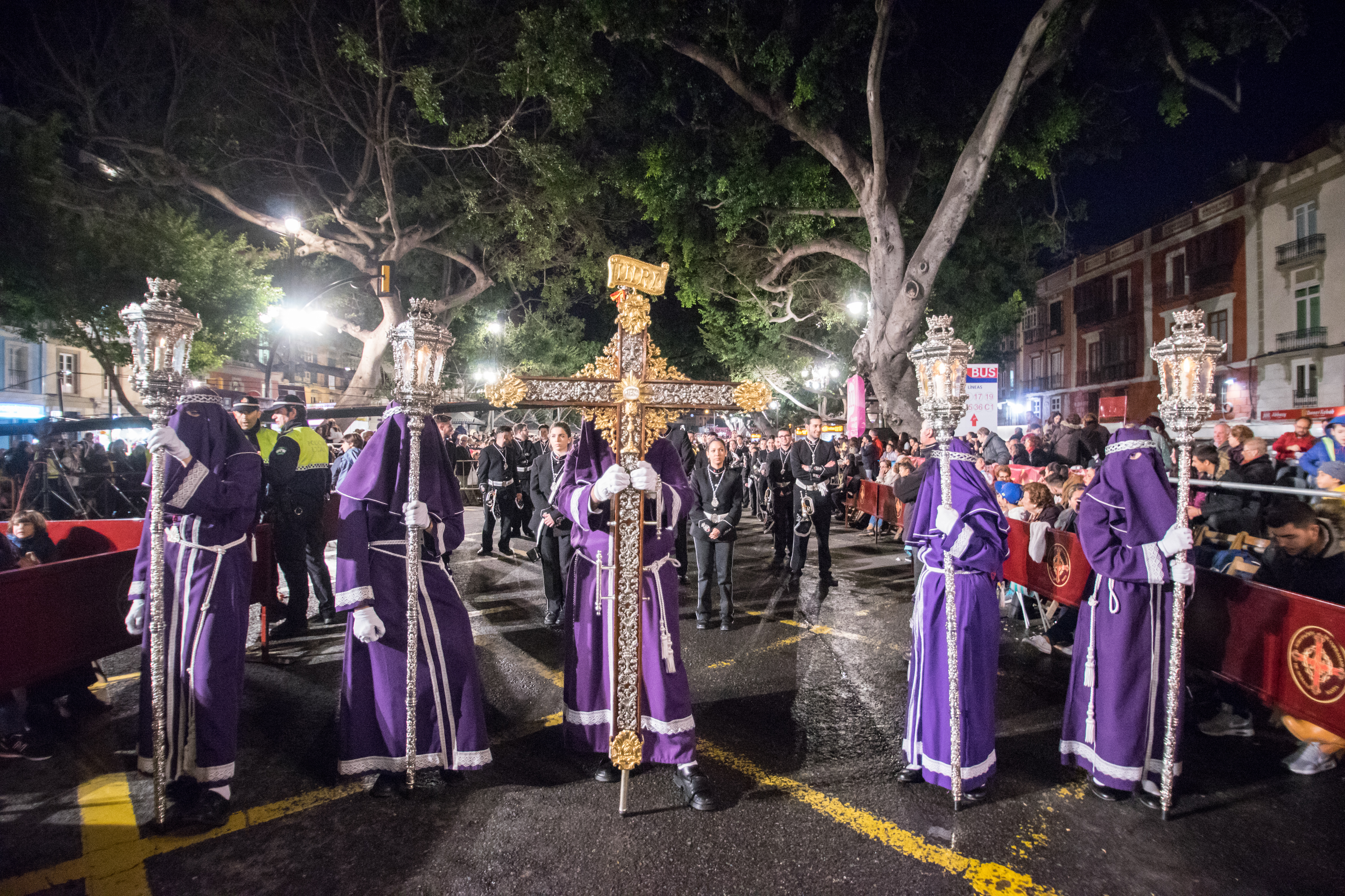 Cruz Guía de la Excelentísima, Muy Ilustre y Venerable Hermandad y Cofradía de Nazarenos de Nuestro Padre Jesús de la Columna y María Santísima de la O, popularmente, Hermandad de los Gitanos This is a photography of a Folklore festival in Spain (Wikidata id Q9075883).